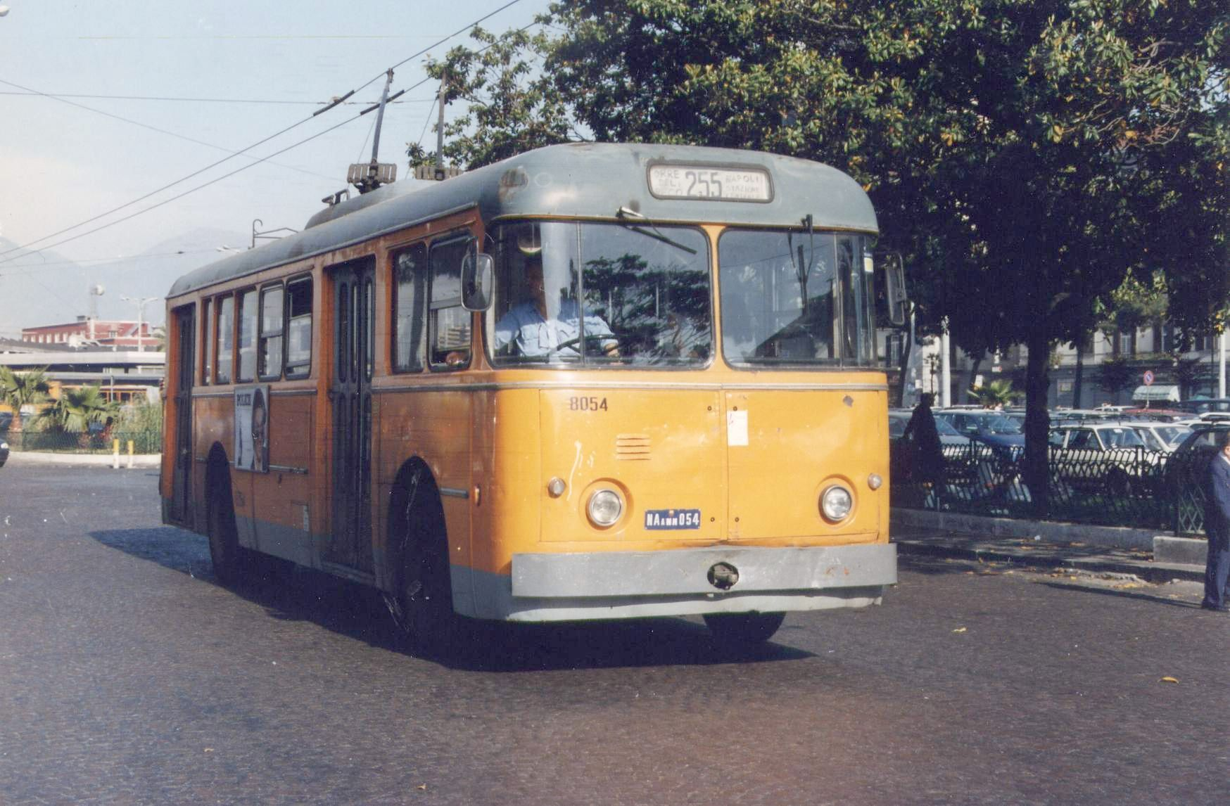 10058-Filobus Alfa Romeo 1000 Aerfer 8054.